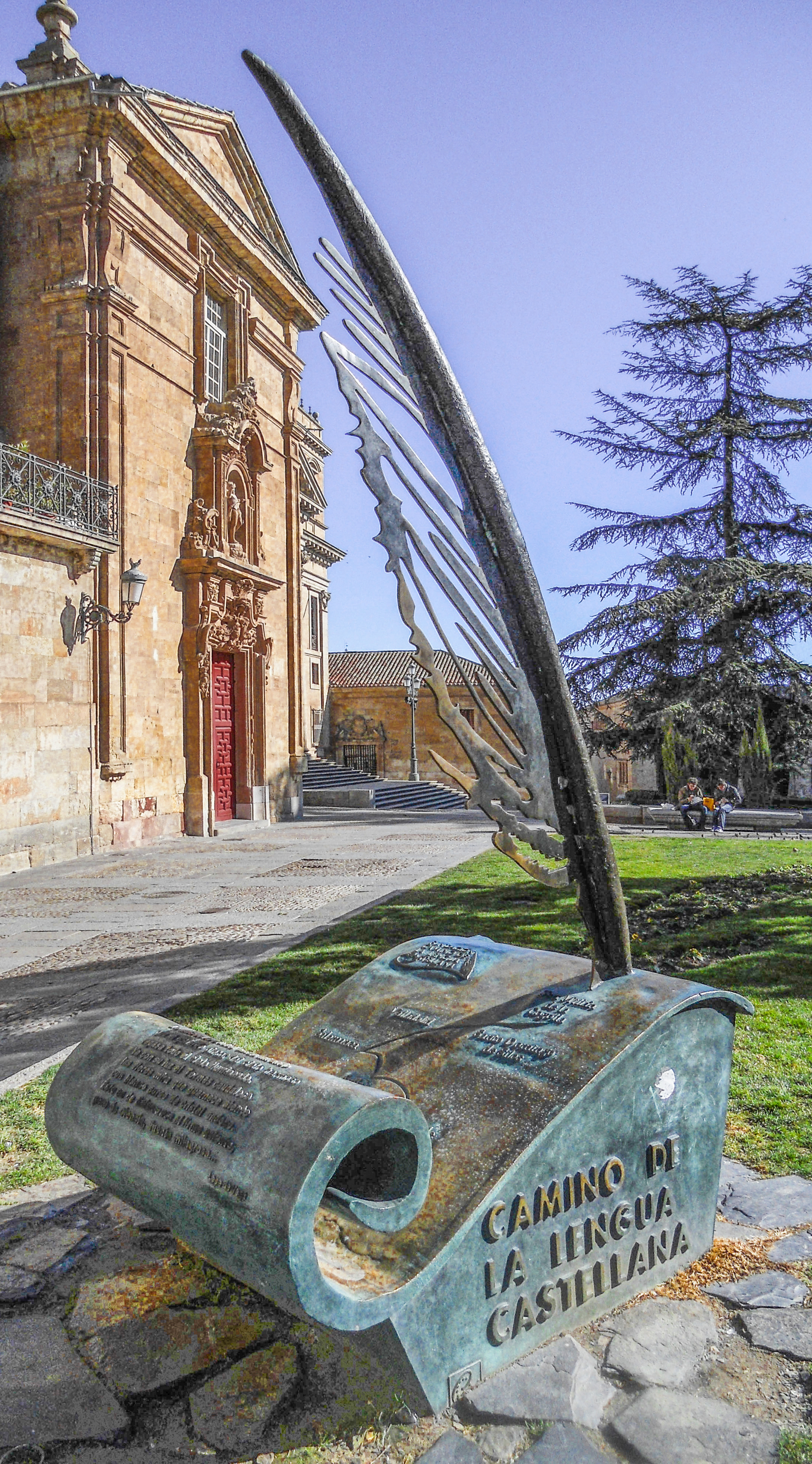 Monumento a la Ruta Camino de la Lengua Castellana en la plaza Anaya de Salamanca (España)